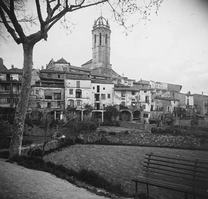 Vista parcial de Moià. Josep Salvany i Blanch (1924)